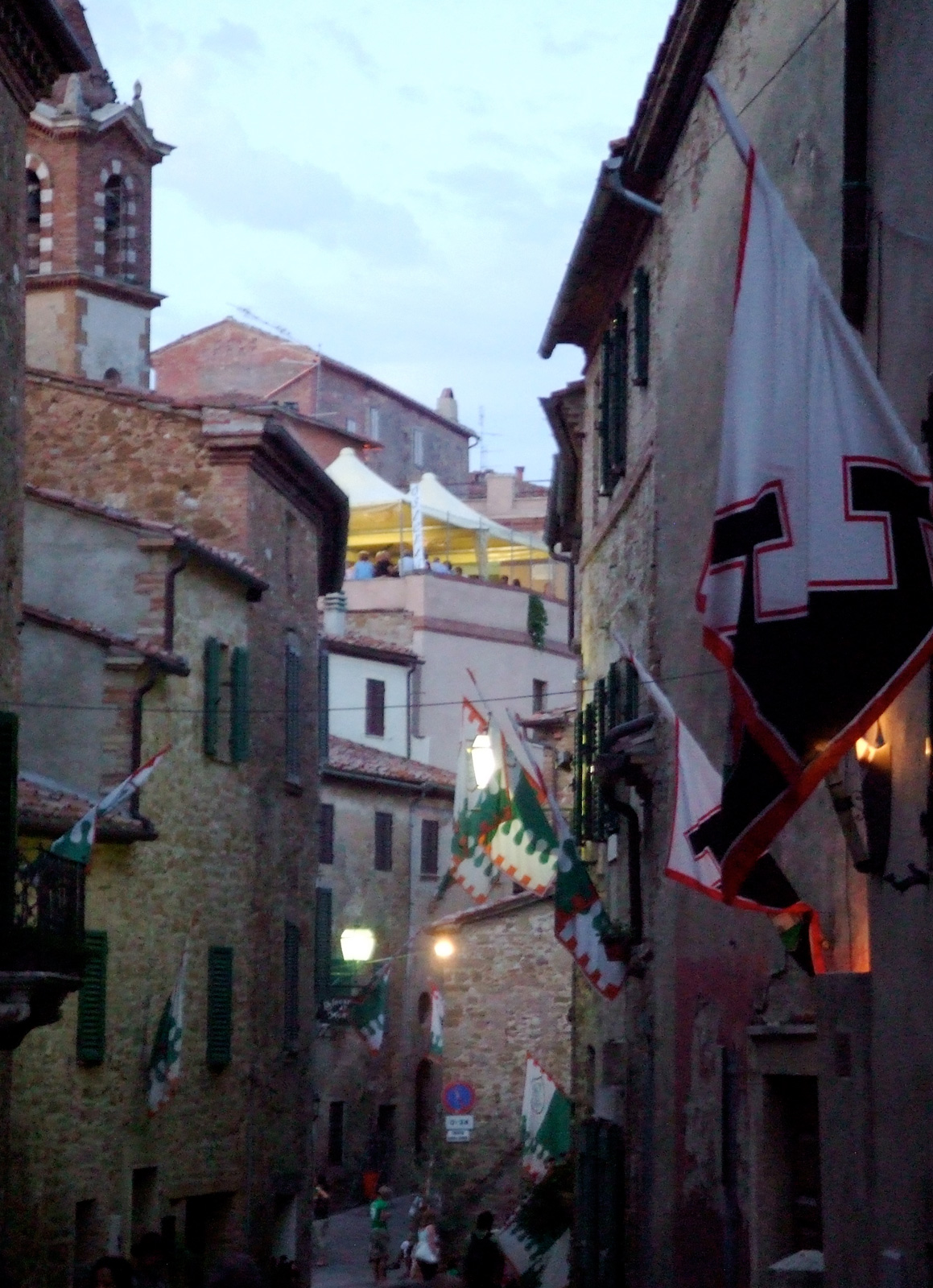 Le pavois des drapeaux des contrade dans le borgo de Montisi lors de la Giostra del Simone